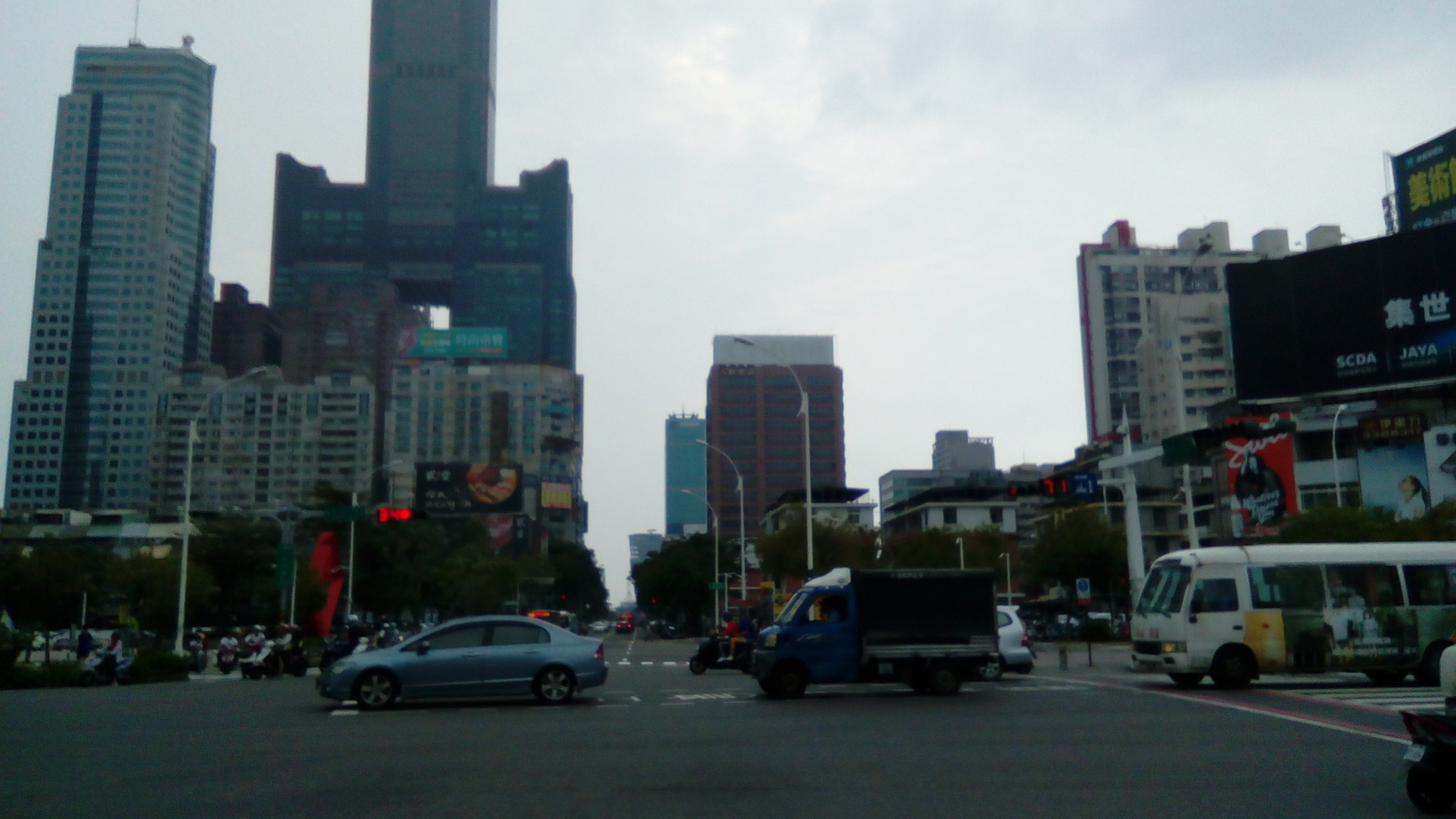 中山路、三多路及一心路口 著名的大遠百、捷運三多商圈站、太平洋SOGO、寶雅、崇光百貨均位於此